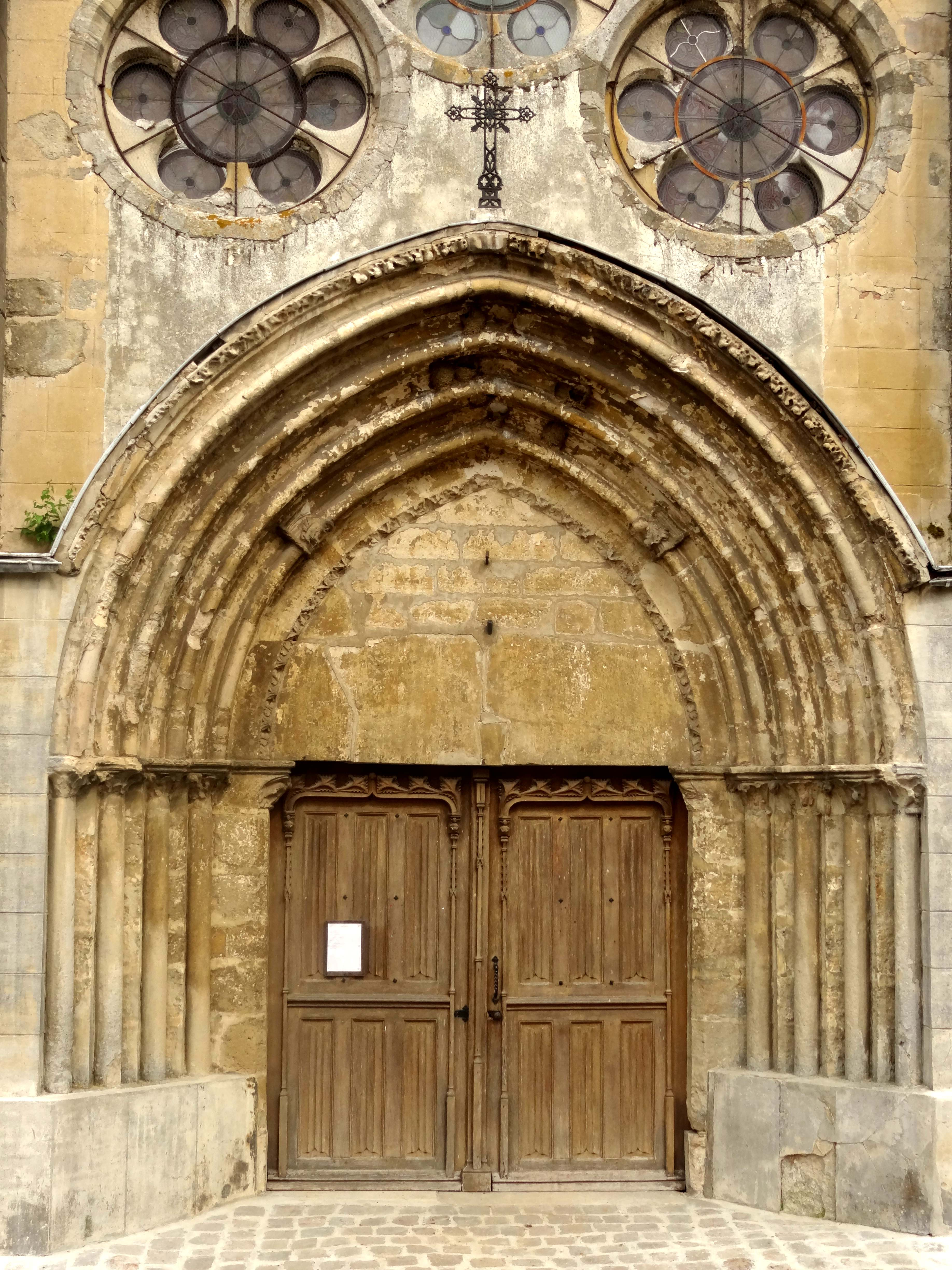 Église Saint-Denis de Ver-sur-Launette - voir titre.